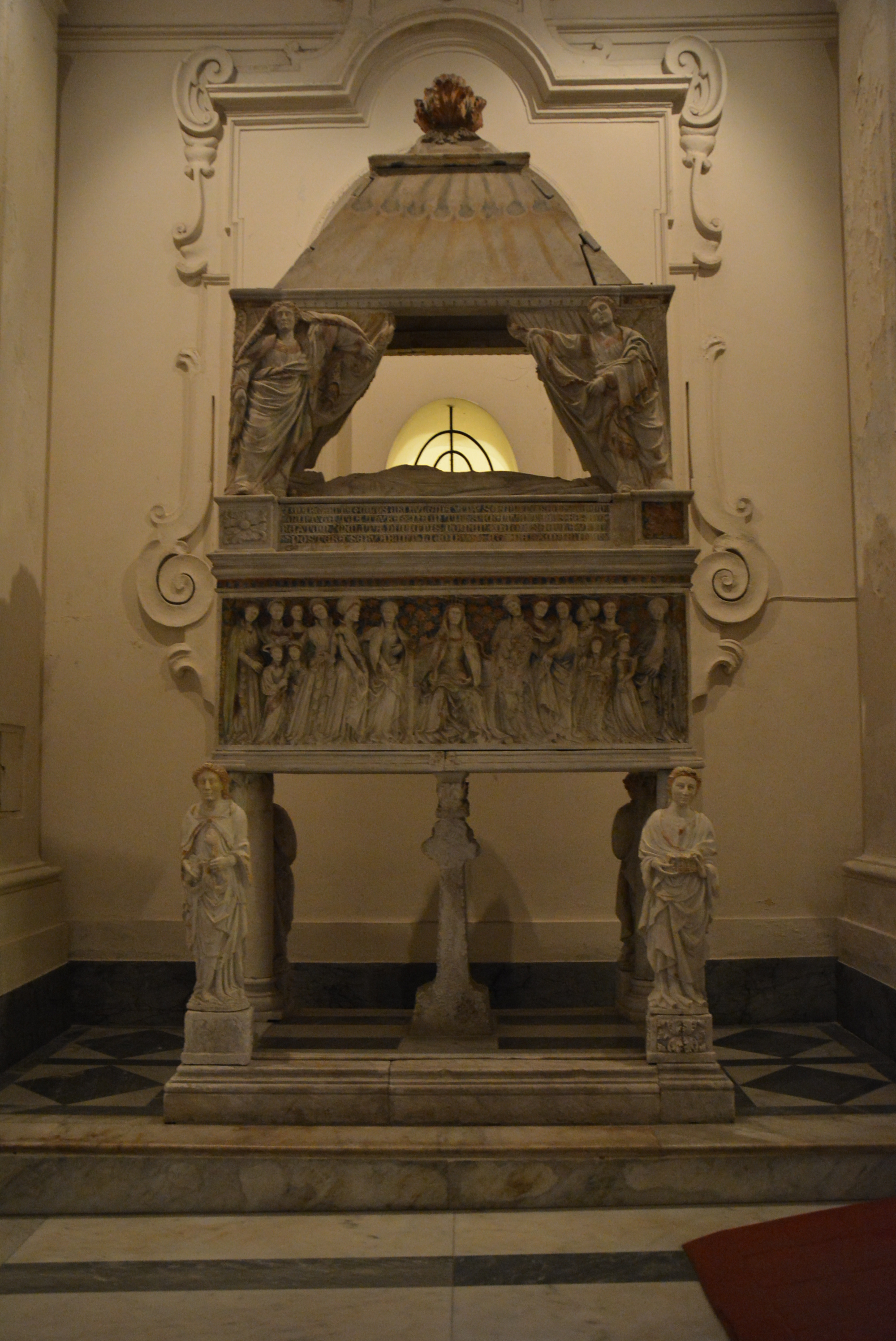 La cattedrale di Salerno